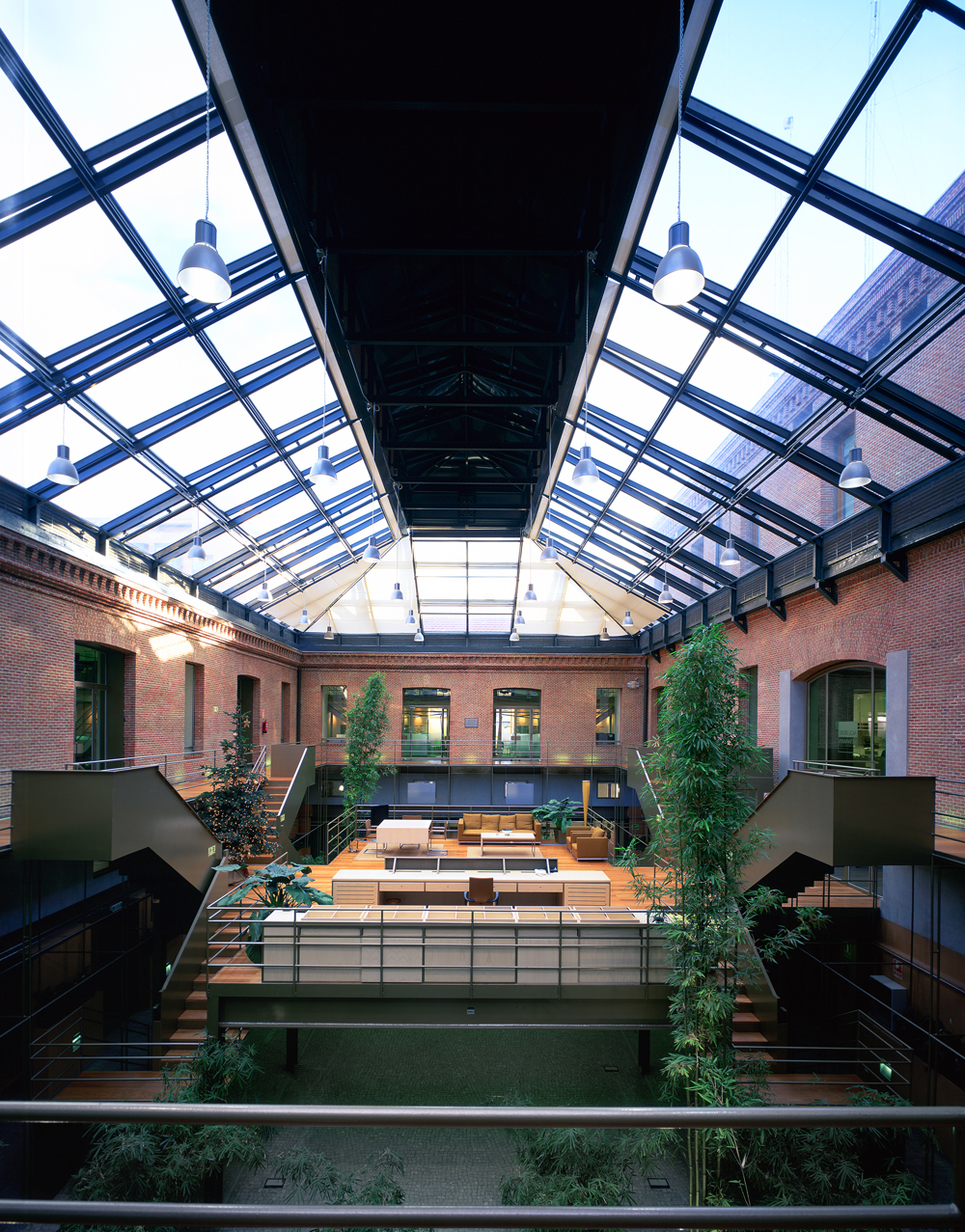 Allende Arquitectos